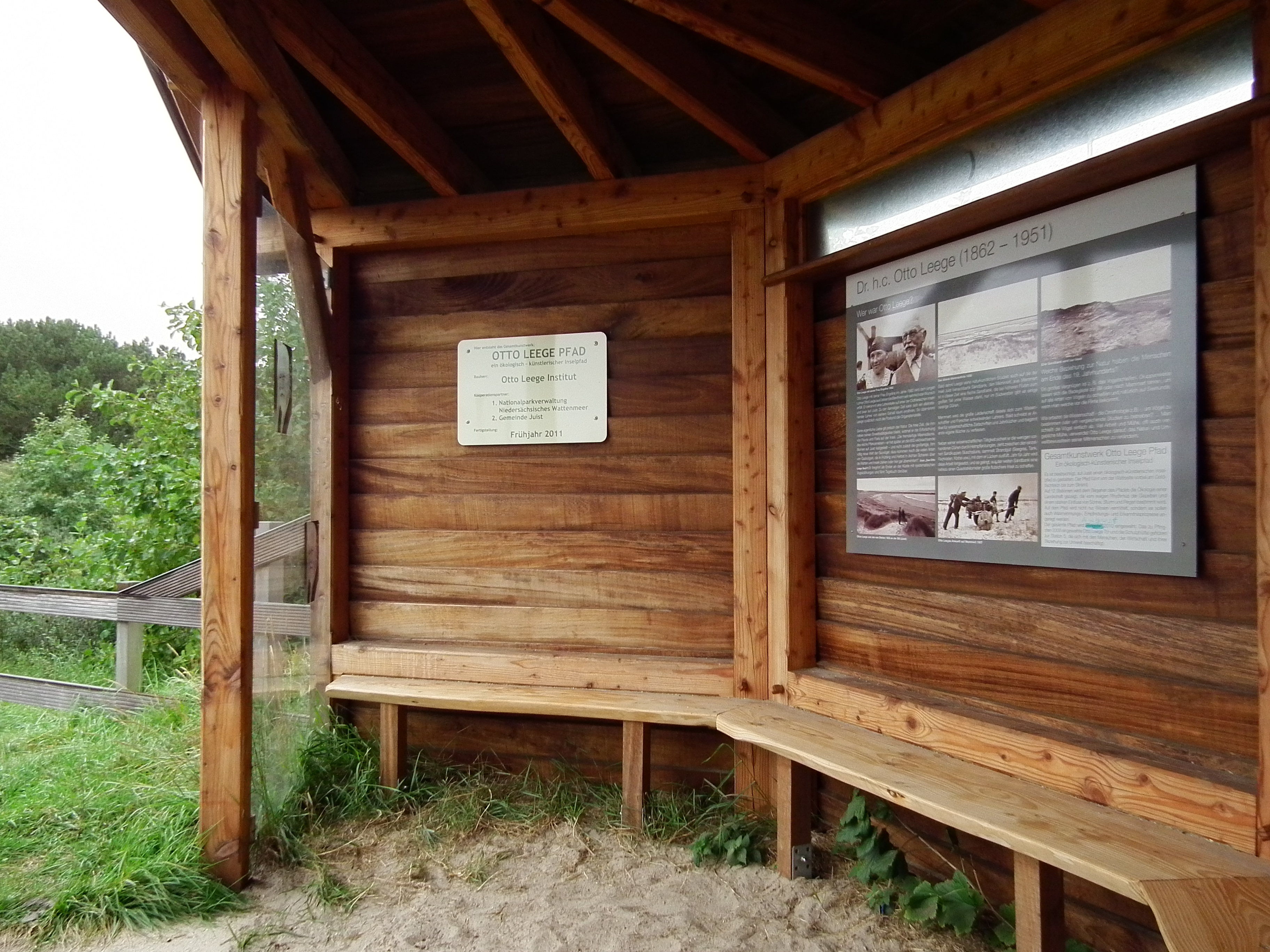 Schutzhütte auf der ostfriesischen Nordseeinsel Juist am Otto-Leege-Pfad (Niedersachsen, Deutschland)